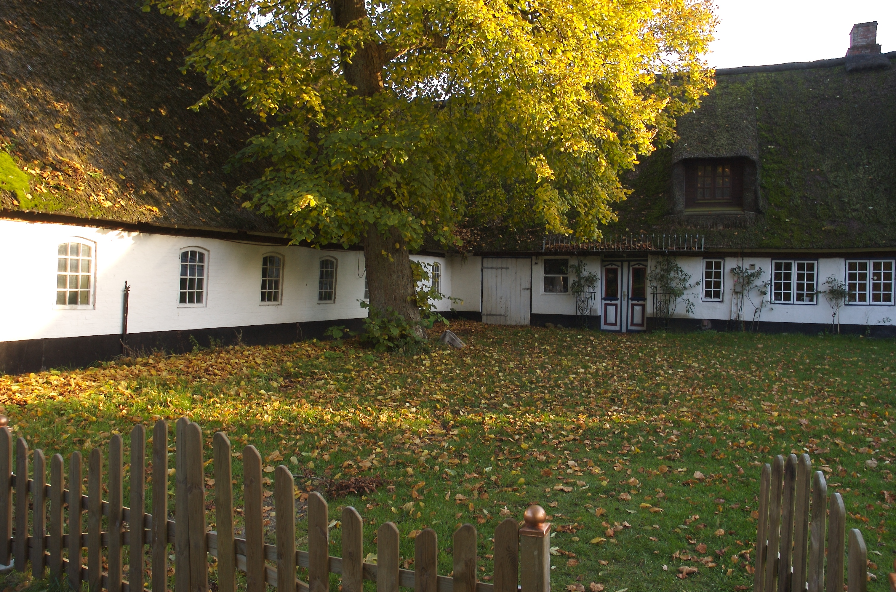 Das Wohnhaus von Rio Reiser in Fresenhagen, Nord-Friesland